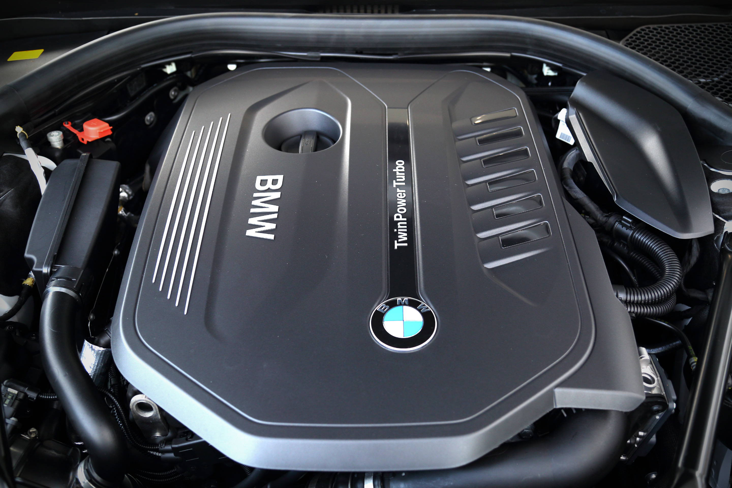 [:ja:BMW・7シリーズ]（G11）に搭載されている[:ja:直列6気筒][:ja:エンジン]。